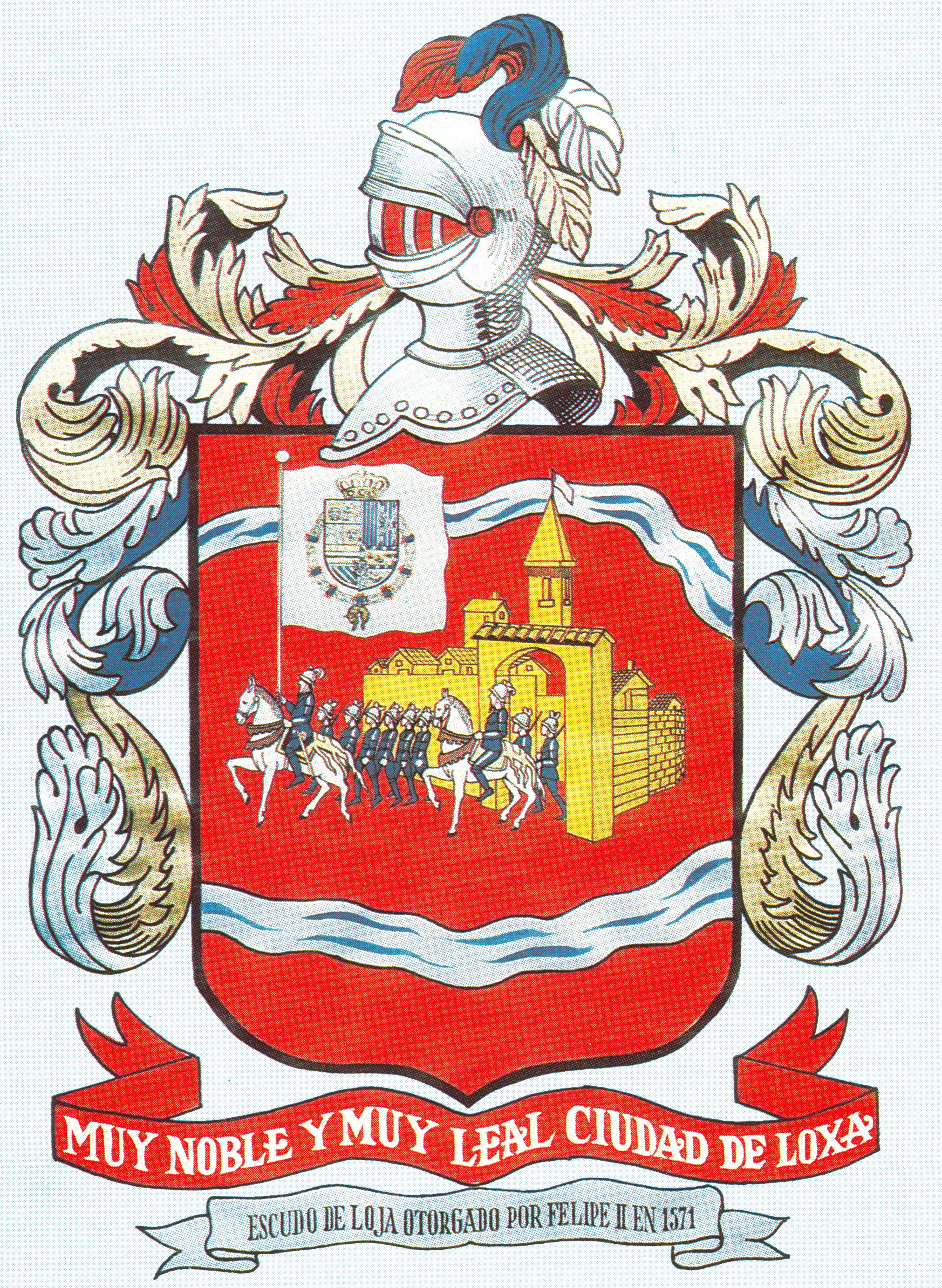 Composición textual del Escudo de Armas de la Muy Leal y Muy Noble Ciudad de la Inmaculada Concepción de Loja en los Reinos del Perú. que relata. Por cuanto Sebastián de Santander, en nombre del Consejo, Justicia y Regimiento de la Ciudad de Loja , en las Provincias del Perú, me ha hecho relación que la dicha ciudad y vecinos de ella nos habían servido bien y lealmente en todas las ocasiones y sucesos que había habido desde el principio de su fundación, y tenían voluntad de lo continuar adelante, suplicándonos que atento a ello, al trabajo y gastos que de ello y de la población de la dicha ciudad habían resultado, porque fuese más honrada y estimada y quedase de ello perpetua memoria, le mandásemos señalar por armas un escudo en campo rojo, que en medio del esté una ciudad de oro y salga de ella una bandera blanca con nuestras Armas Reales en ella y tras ella mucha gente de guerra que la sigue, y la ciudad esté cercada por dos ríos de azur y plata o como la vuestra merced fuese, e yo acatando los dichos servicios. Dada en Madrid a cinco de Marzo de Mil Quinientos Setenta y Un años. YO EL REY. Simbolos Patrios de la Ciudad de Loja - República del Ecuador